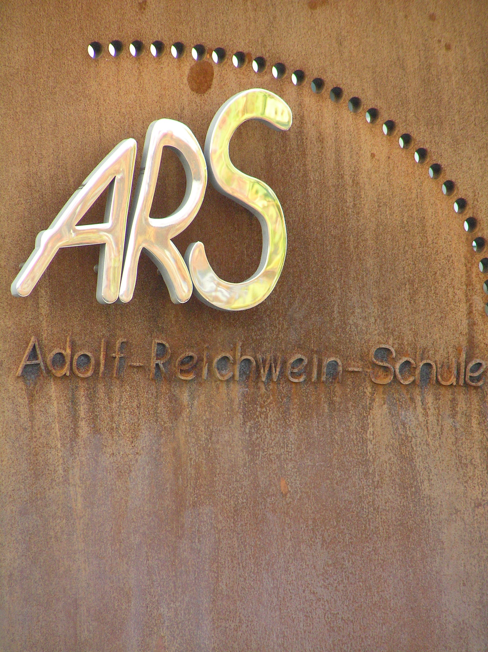 Schild der ARS in Neu-Anspach